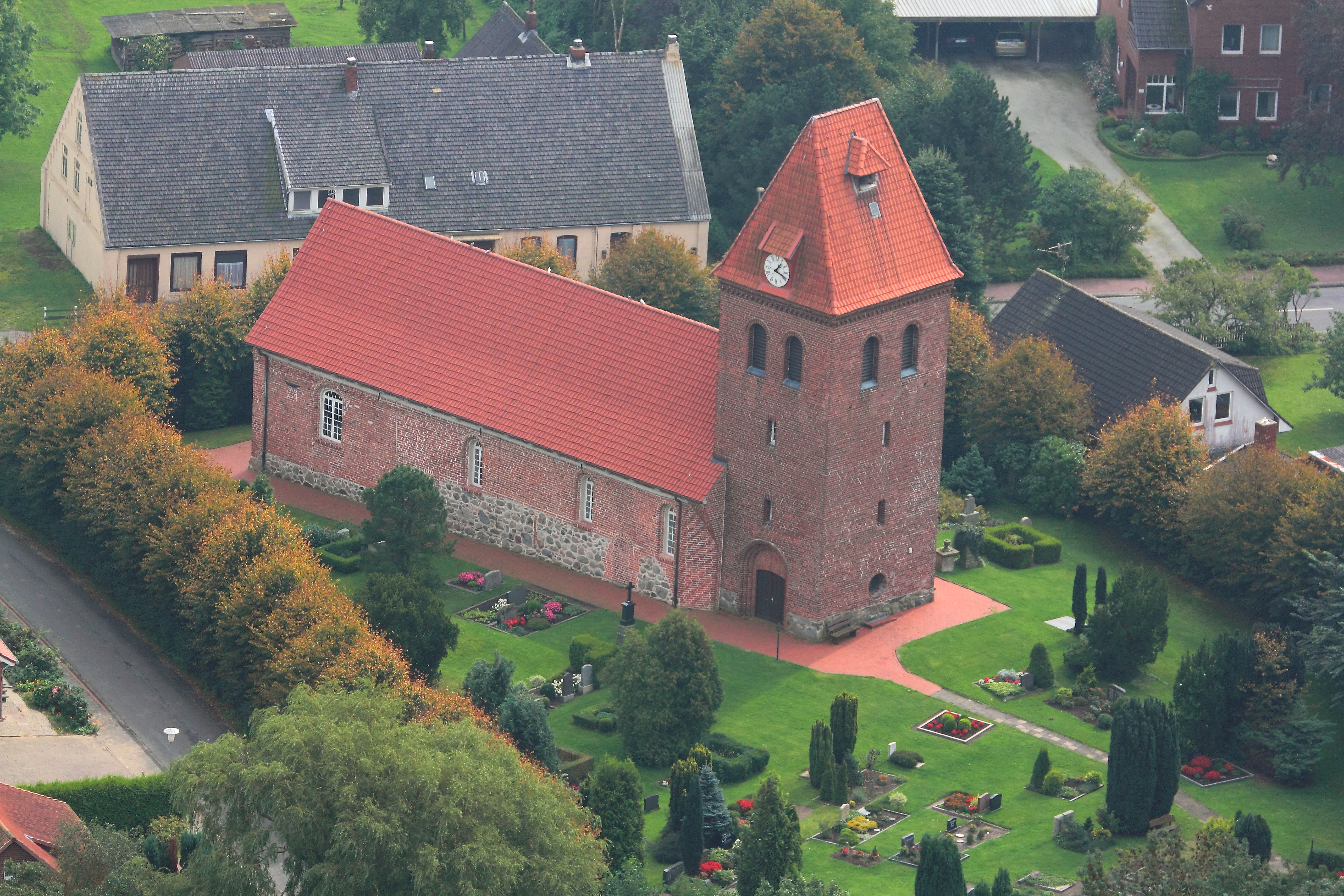 Luftaufnahme der St. Georgkirche, Spieka (zu Nordholz)